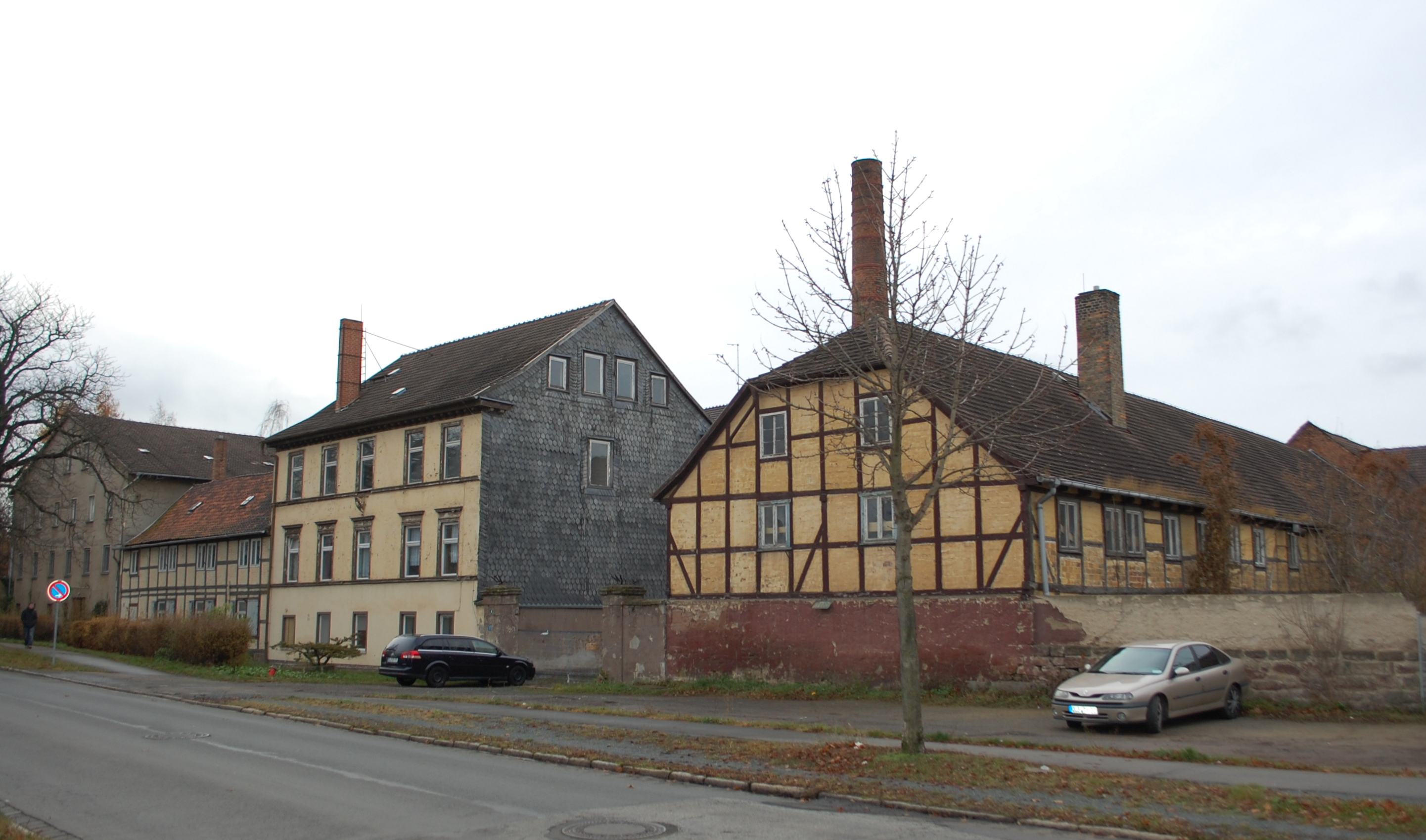 ehemalige Zuckerfabrik in Quedlinburg